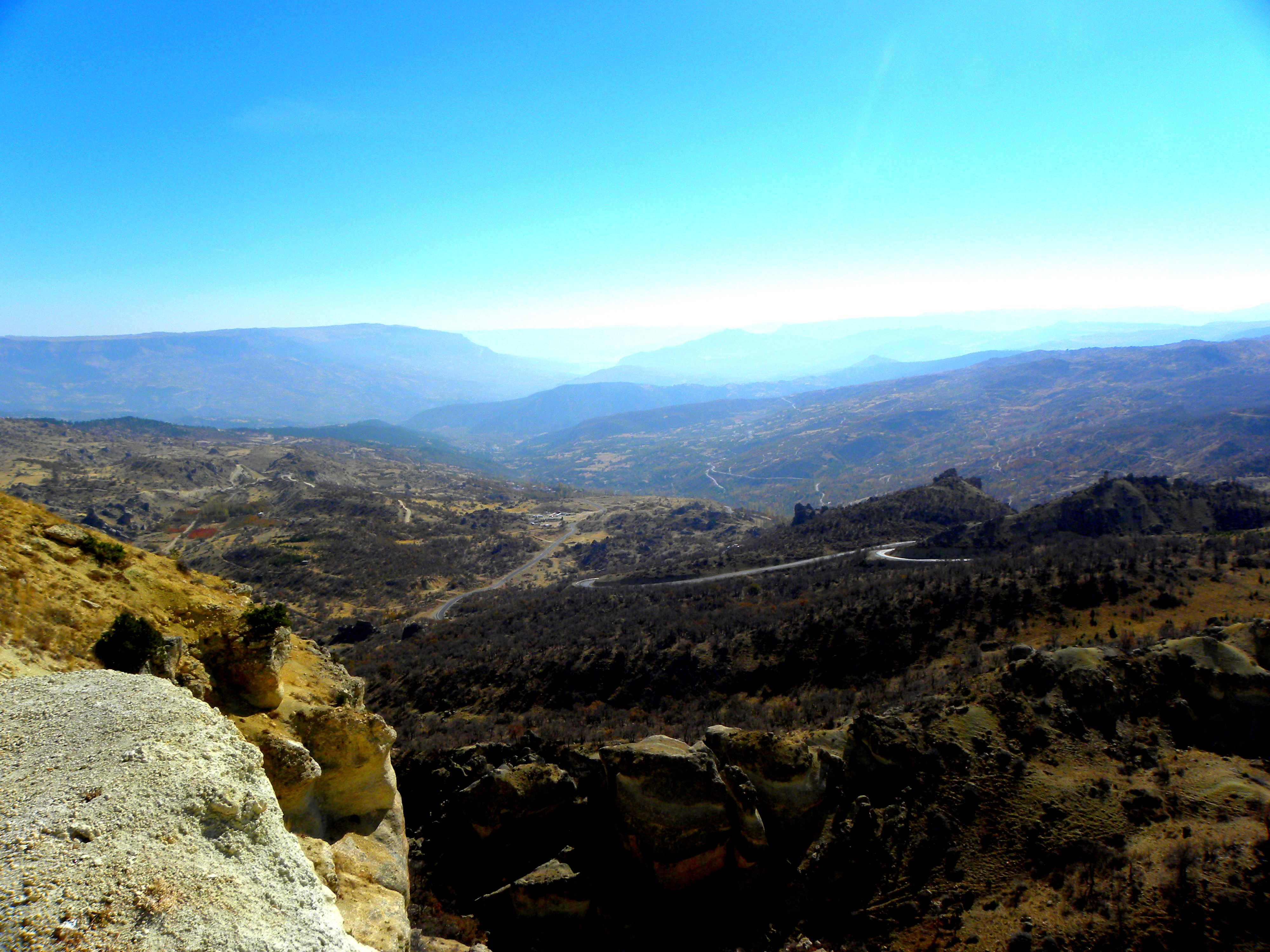 Başköy, 70700 Başyayla/Karaman, Turkey